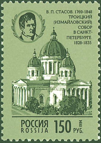 В. П. Стасов. 1769-1848. Троицкий (Измайловский) собор в Санкт-Петербурге 1828-1835. Почтовая марка России